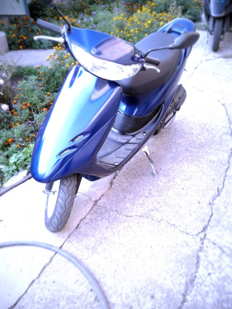 Nikopol